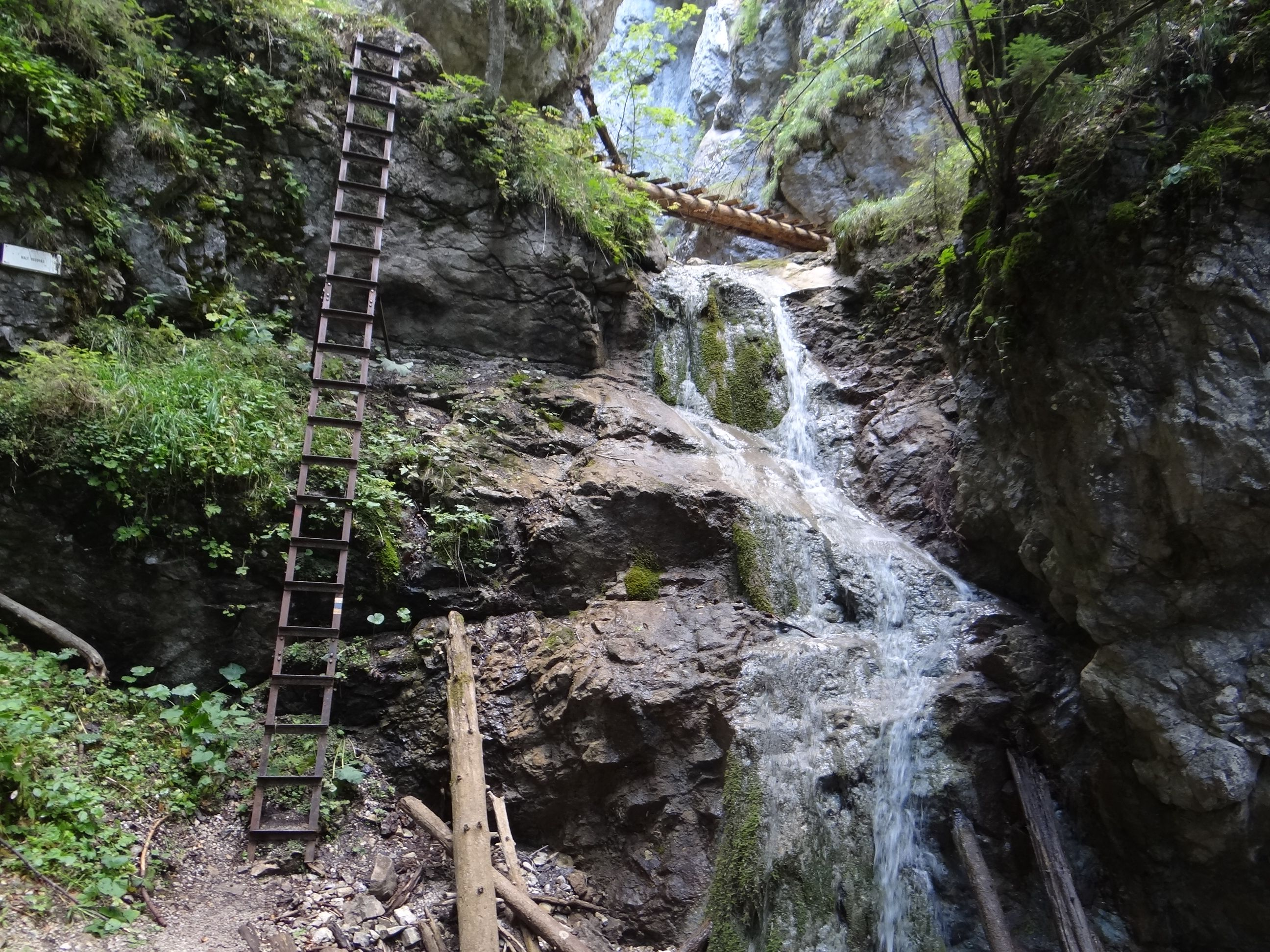 Malý Kyseľ (Malý vodopád)